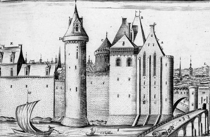 Gravure sur cuivre extraite de Topographie Française de Claude Chastillon publiée entre 1644 et 1648 (Bibliothèque municipale de Tours) montrant le château de Tours dans son état après transformation par Philippe III le Hardi au XIII° siècle. Il englobe l'édifice réalisé au XI° siècle par les Plantagenets. L'emplacement de la chapelle, contre la tour Ouest (ici à droite), semble erroné, selon Vassy Malatra, Le château de Tours : nouvelles approches in Bulletin de la Société archéologique de Touraine, tome LVII, 2011, p. 129